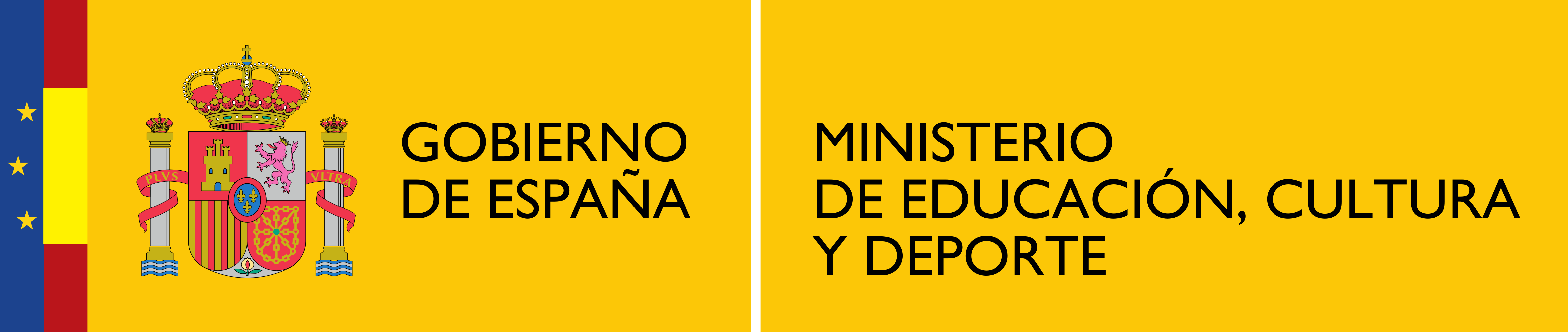 Logotipo del Ministerio de Educación, Cultura y Deporte